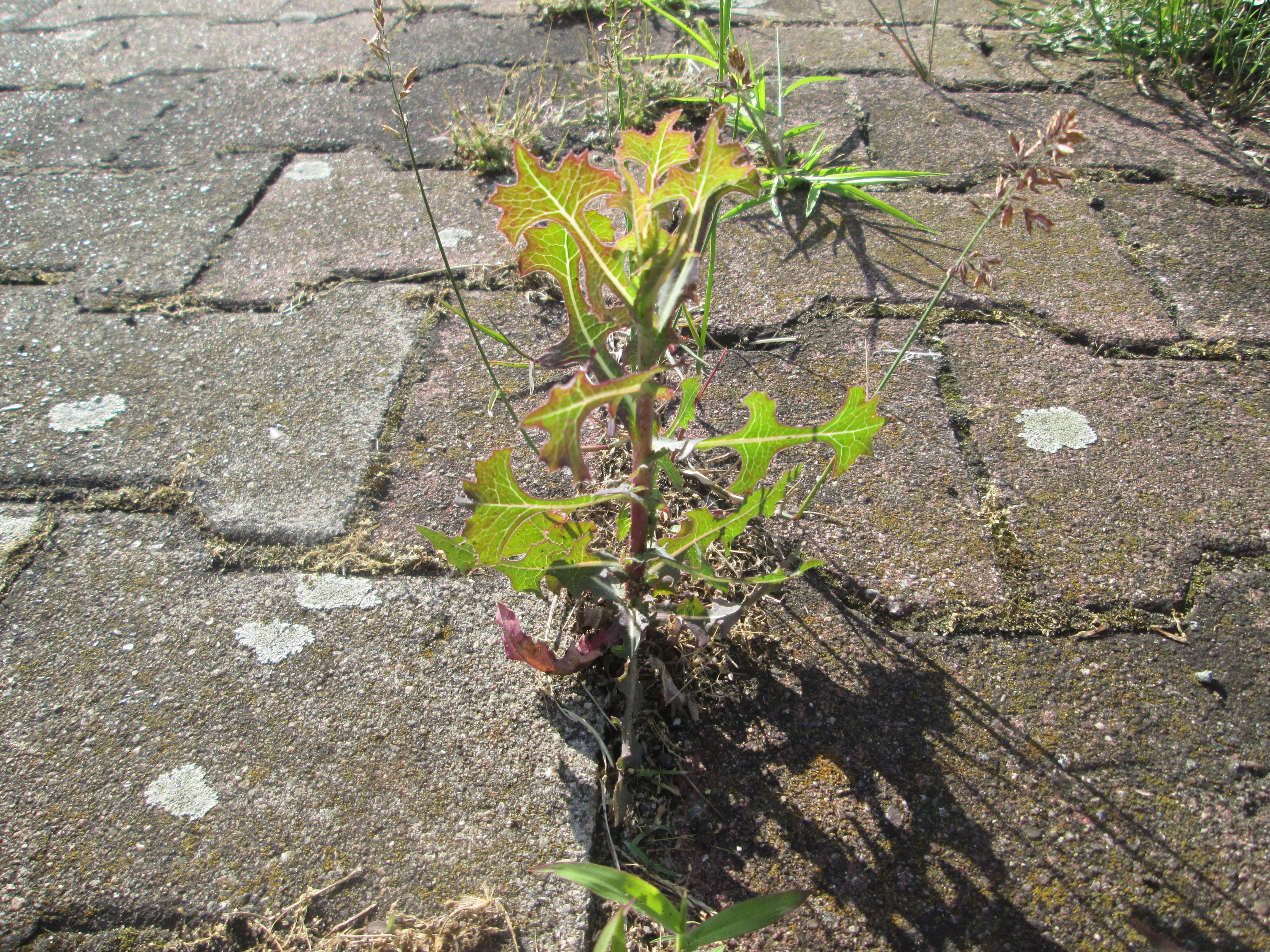 Gift-Lattich (Lactuca virosa) am Hauptbahnhof Mannheim